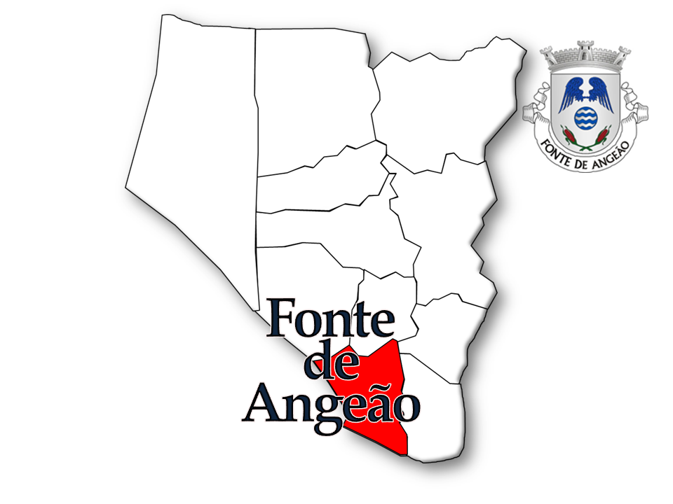 Evolução da População